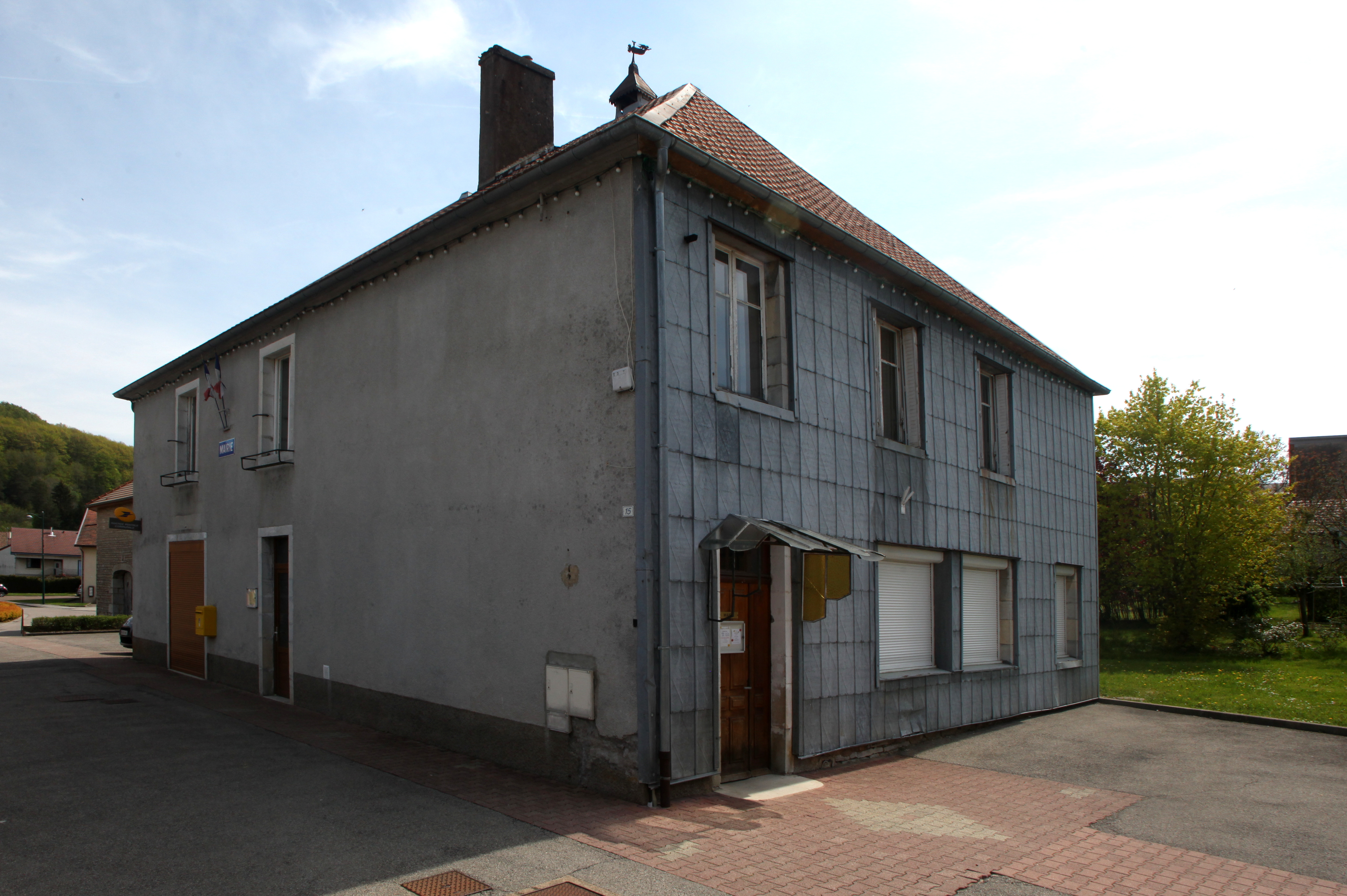 Mairie de Tarcenay (Doubs).